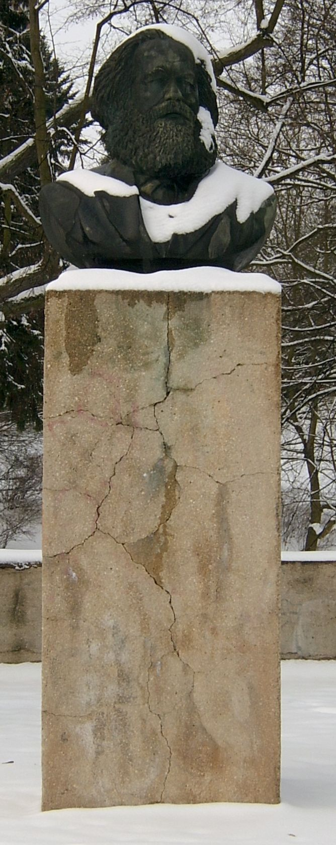 Büstendenkmal von Karl Marx von Fritz Cremer in Frankfurt (Oder). - OpenStreetMap(Info)